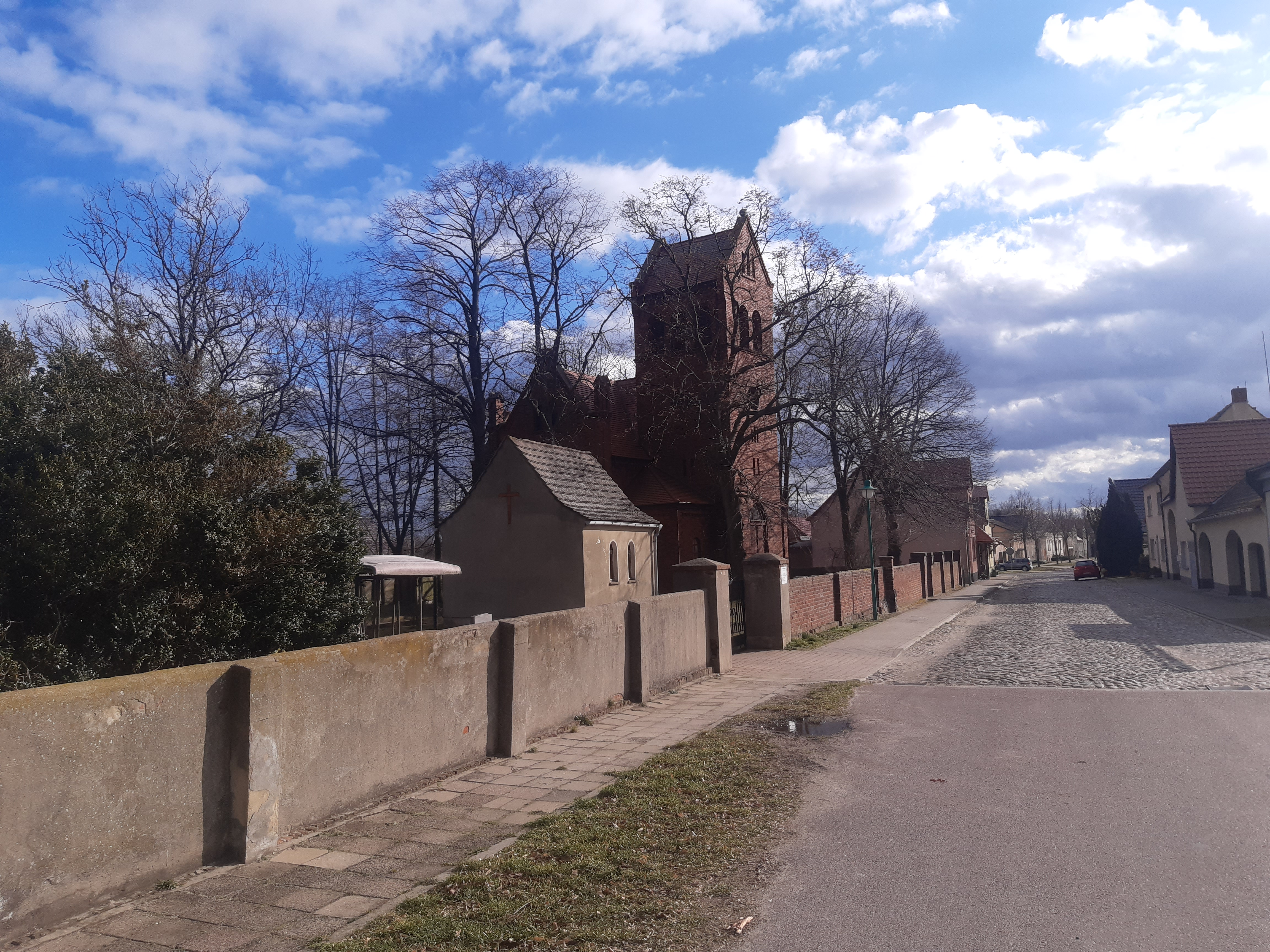 Kirche